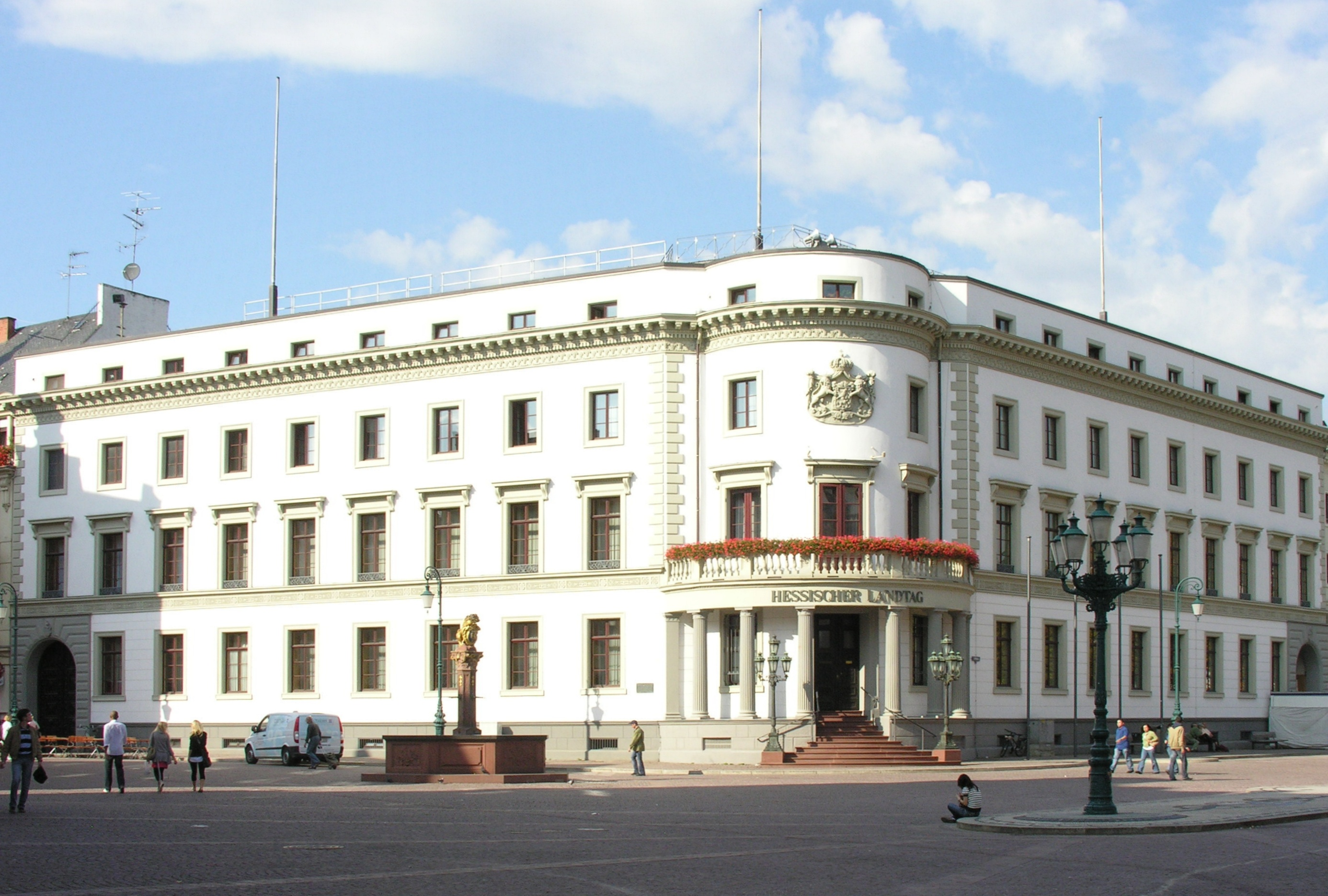 Gebaeude Hessischer Landtag Hessen im Stadtschloß Wiesbaden am Schloßplatz 2007 - Foto Wolfgang Pehlemann DSCN1417.jpg